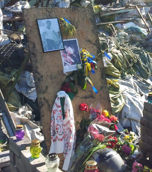 Восьма барикада, навпроти станції м. Хрещатик, по вулиці Інституцькій (вул. Небесної Сотні) Місце загибелі Гриневича Єдуарда Михайловича. Загинув 20.02.14. о 10:25